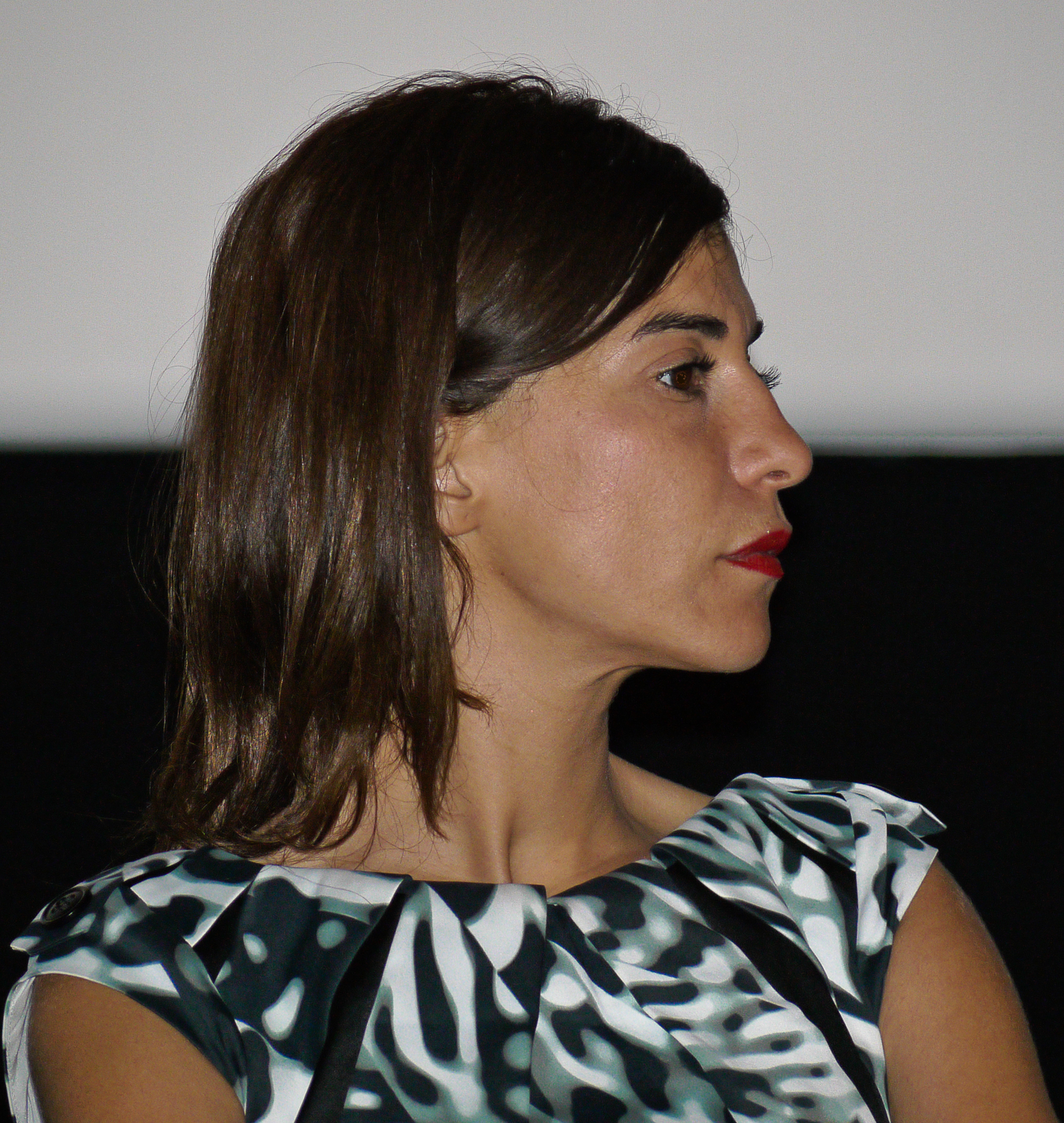 Loubna Azabal à l'avant première du film Les Hommes libres d'Ismaël Ferroukhi - Paris Cinéma